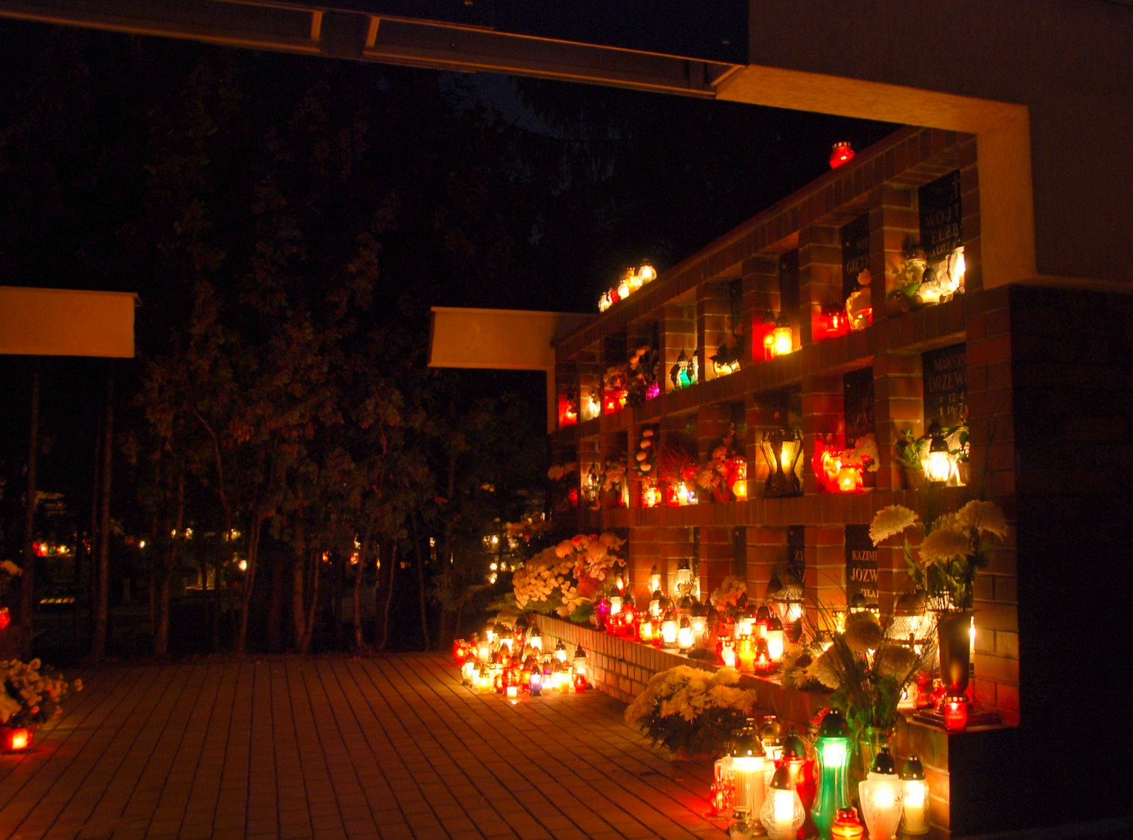 Włocławek,cmentarz 01.11